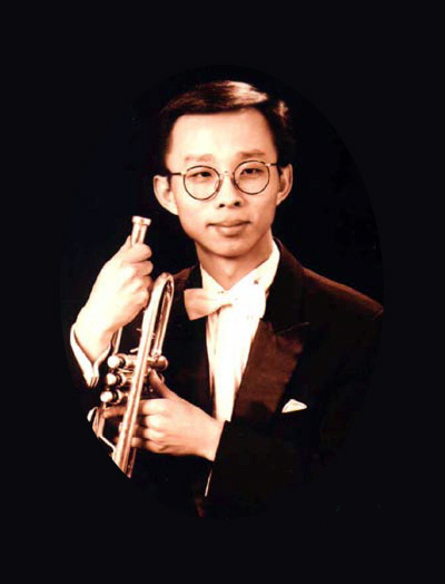 小号演奏家刘胜南